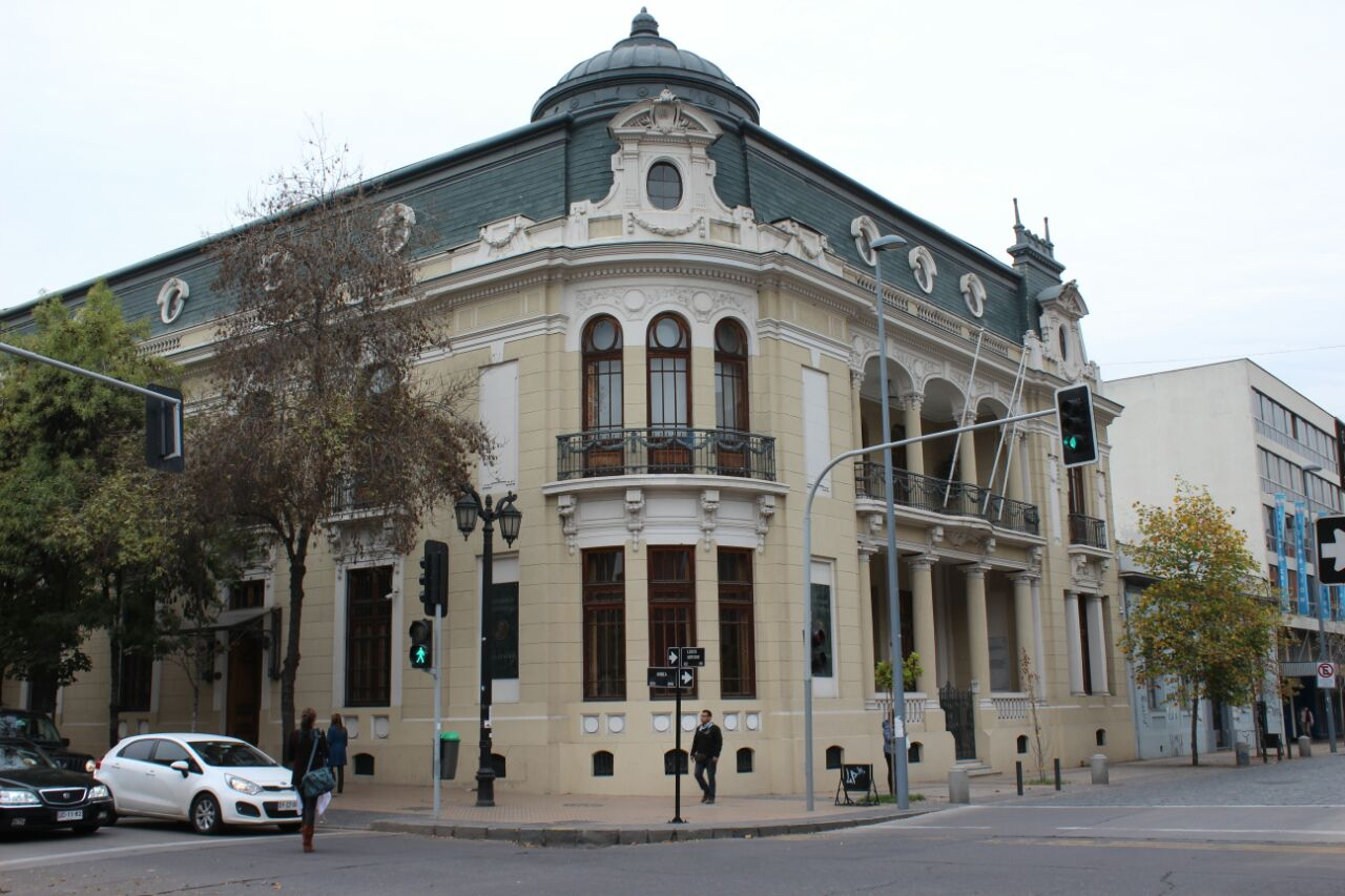 Ex Palacio Piwonka Jilabert, actual Casa Central de la Universidad Diego Portales